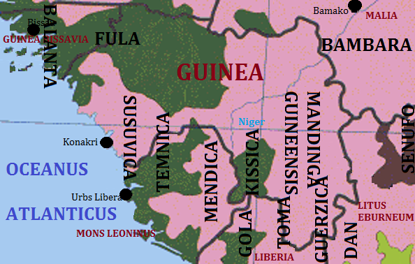 Praecipua linguae in Republica Guineensi et Mons Leoninus.